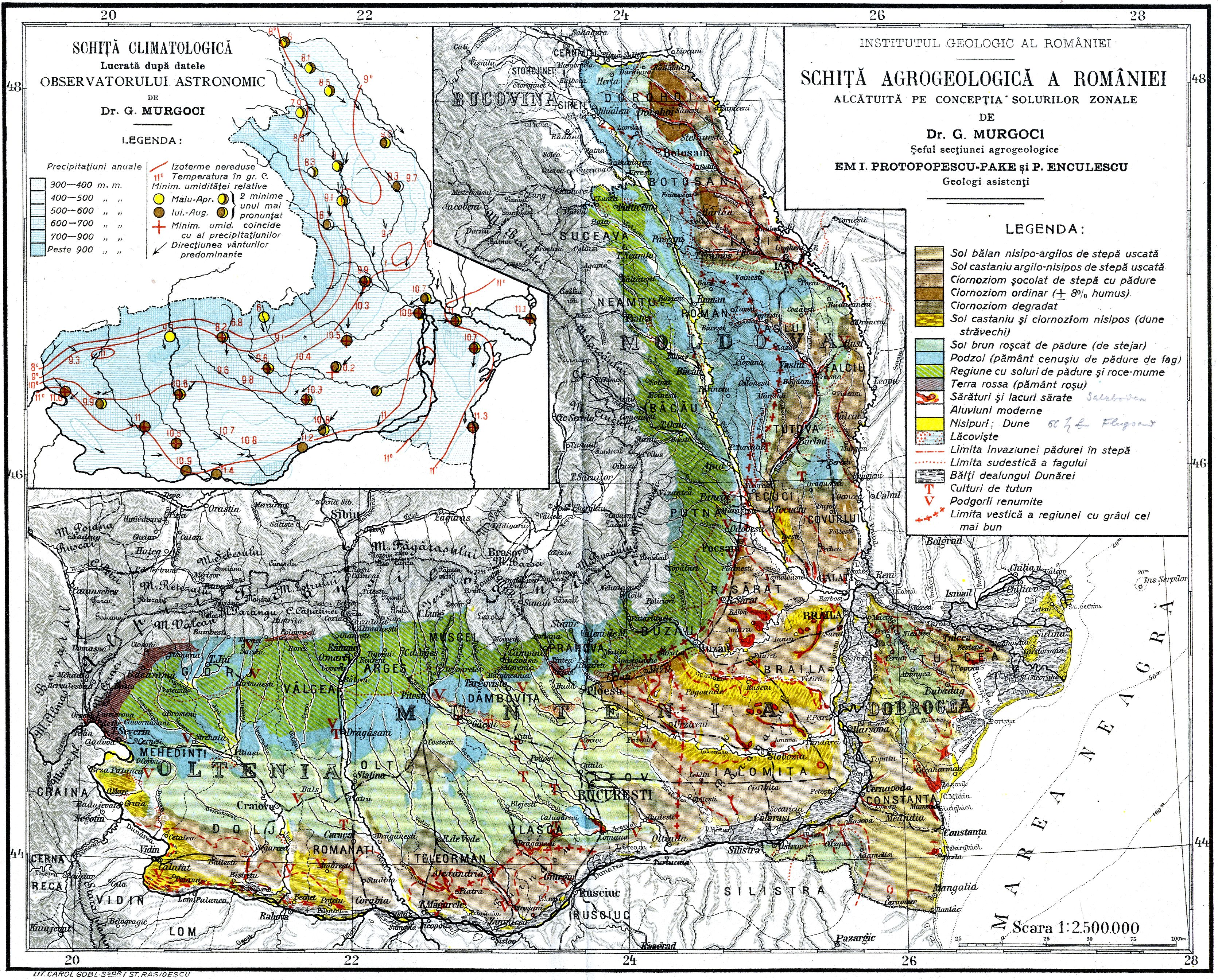 Harta solurilor si harta climatica a Romaniei. Vezi şi textul ataşat acestei hărţi (1 şi 2).